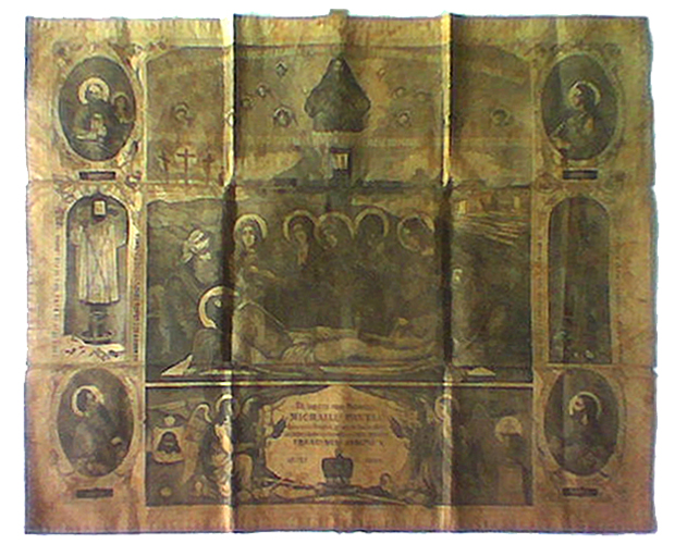 Antimension / Antimis / Αντιμενσιον. Consacré par Mgr Michel Paul, Oradea-Mare (Transylvanie), 1890.